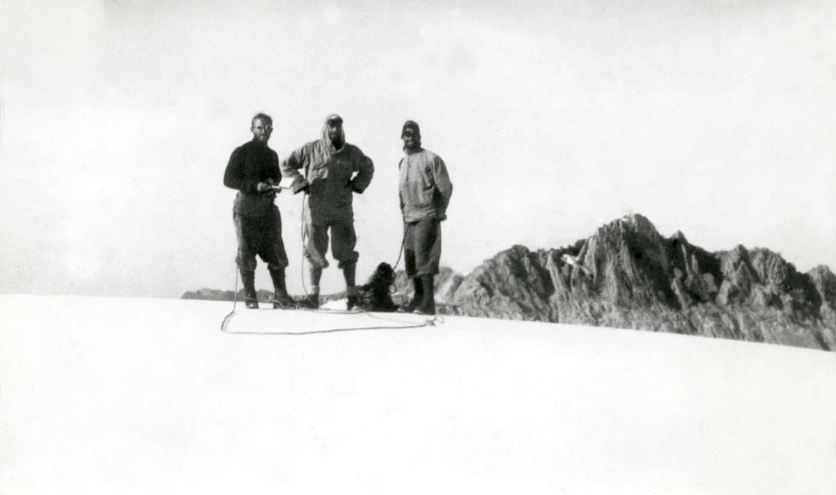 Bergsport. [Expeditie van A.H. Colijn naar Carstenszgebergte] in Nieuw Guinea 1936. Foto Anton Colijn, Frits Wissel en Jean Jacques Dozy poseren in de sneeuw voor de fotograaf tijdens de Carstensz-expeditie].